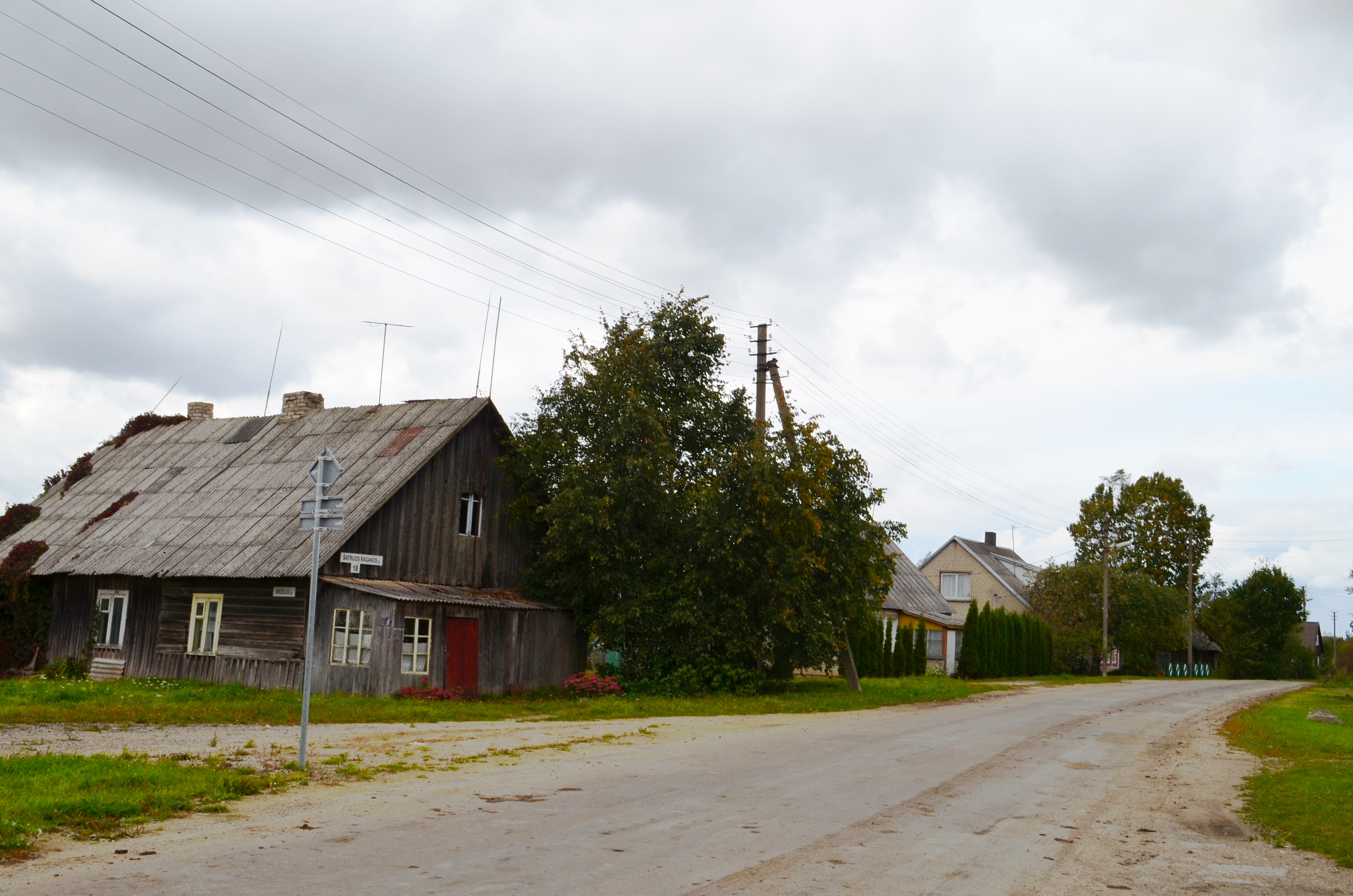 Šatrijos Raganos gatvė, Pavandenė, Telšių raj.